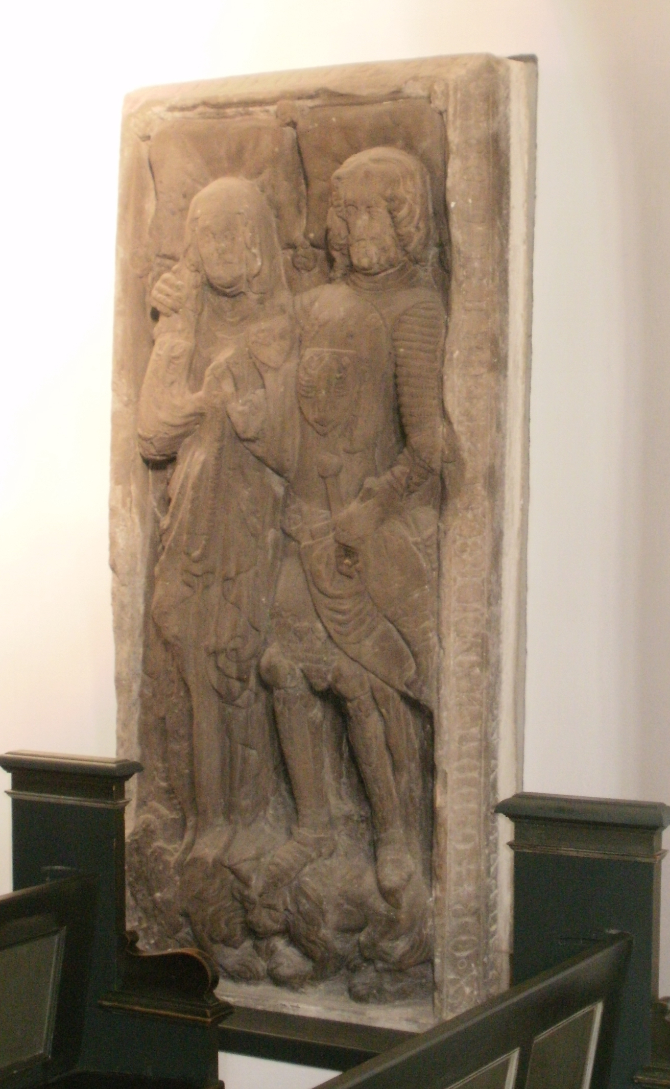 Grabdenkmal für Fredehelm und Adelheid in der Cottbuser Klosterkirche